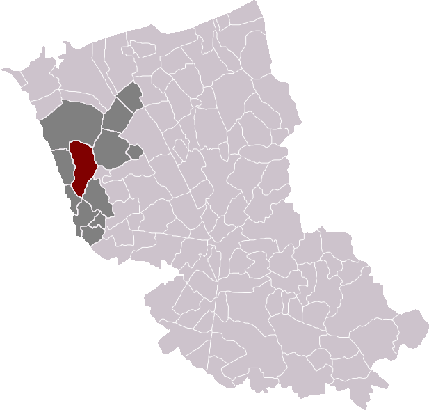 Locatie gemeente Kapellebroek in arrondissement Duinkerke. Zelfgemaakt. Location of Cappelle-Brouck municipality in the arrondissement of Dunkirk. Self made. Localisation de la commune de Cappelle-Brouck dans l'arrondissement de Dunkerque. Fait moi-même.